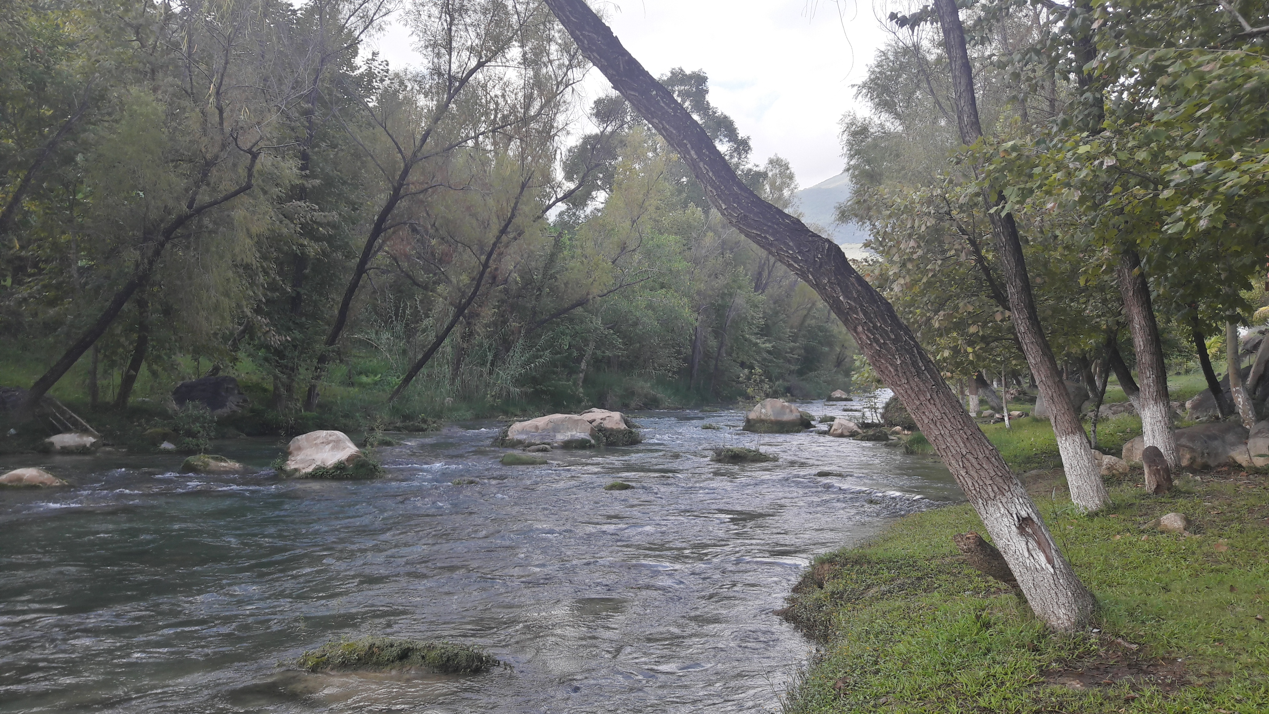 Río Ayutla, foto capturada a lado del campamento "Los Sauces".